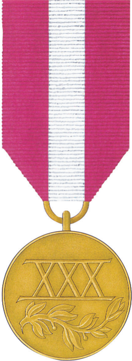 Złoty Medal za Długoletnią Służbę. Rewers.